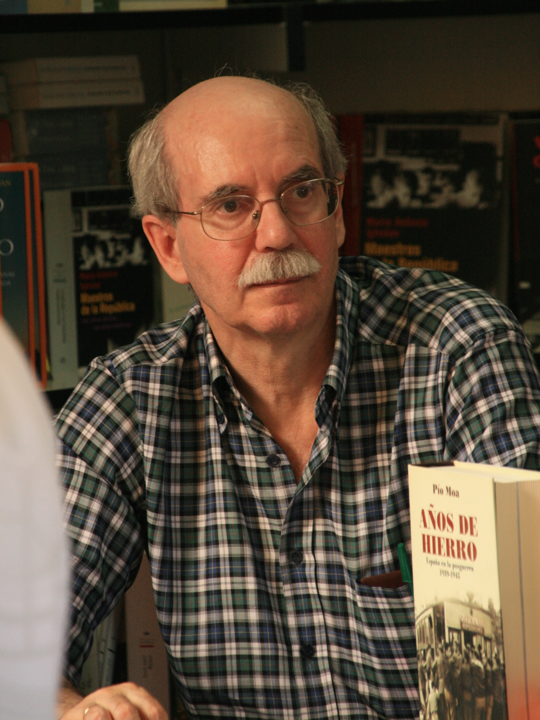 Pío Moa firmando en la Feria del Libro de Madrid en el parque del Retiro